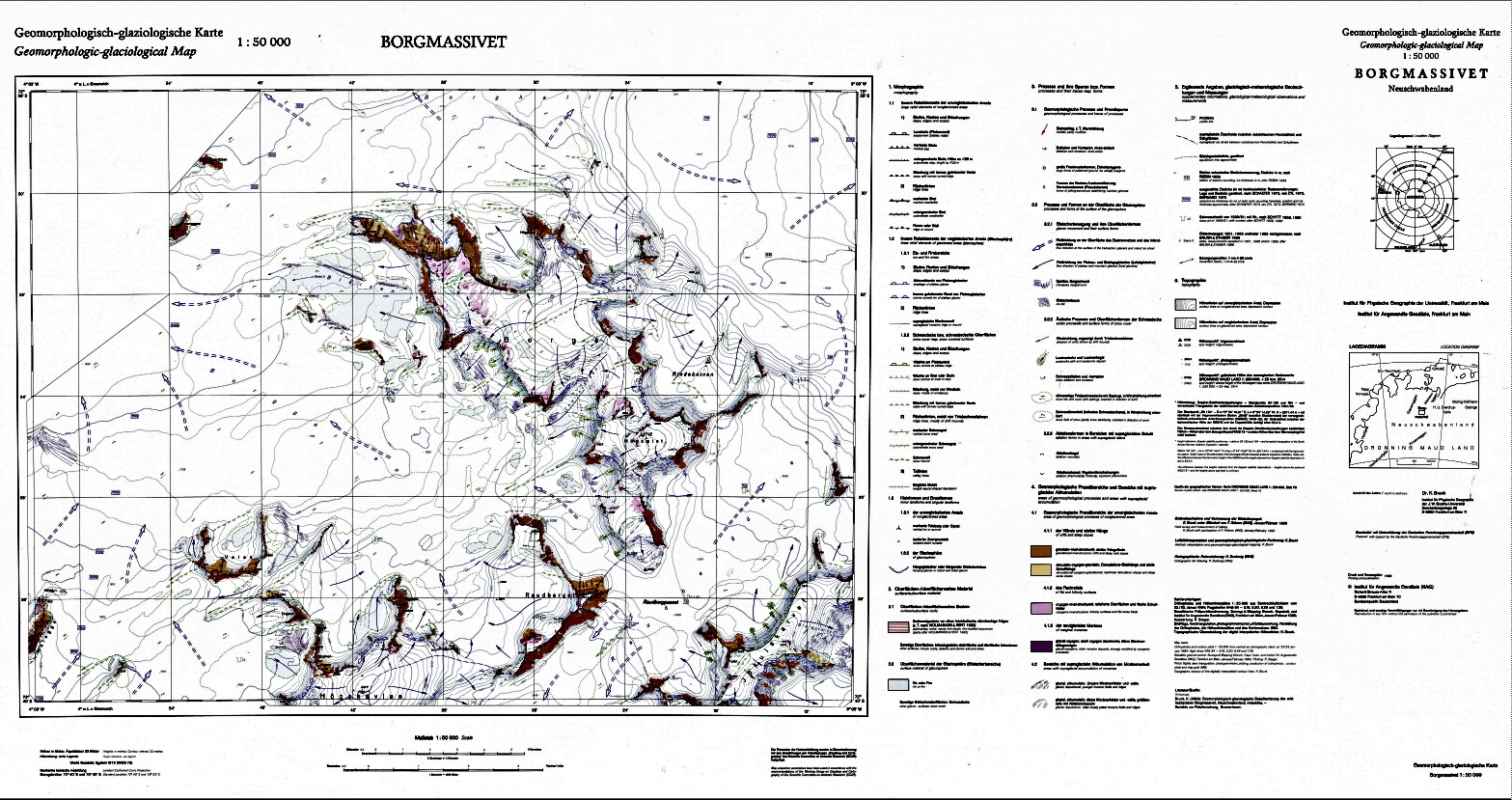 Borgmassivet – geomorphologisch-glaziologische Karte 1 : 50 000, Ausgabe 1989 [SCAR map no. 8169]